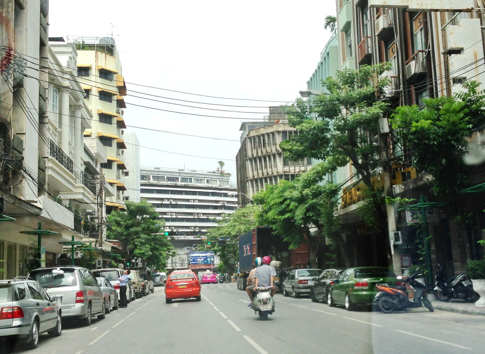 Lamphun Chai, Talat Noi, Samphanthawong, bangkok